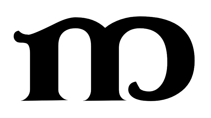 ന മലയാളം അക്ഷരം